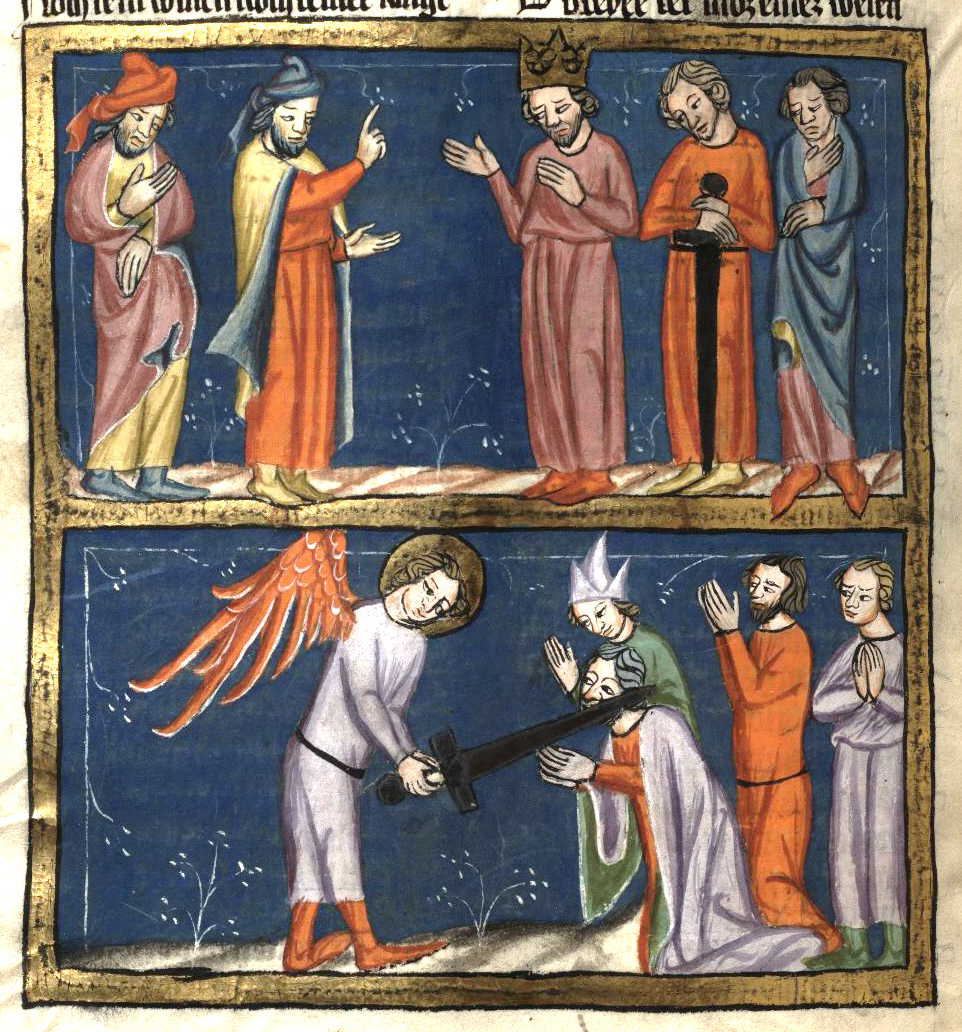 Rudolf von Ems: Weltchronik. Böhmen (Prag), 3. Viertel 14. Jahrhundert. Hochschul- und Landesbibliothek Fulda, Aa 88. Bildbeschreibung nach Martin Roland. fol. 298v, Miniatur 179 Der Prophet Gad vor David / Miniatur 180 Der Engel Gottes schlägt das Volk